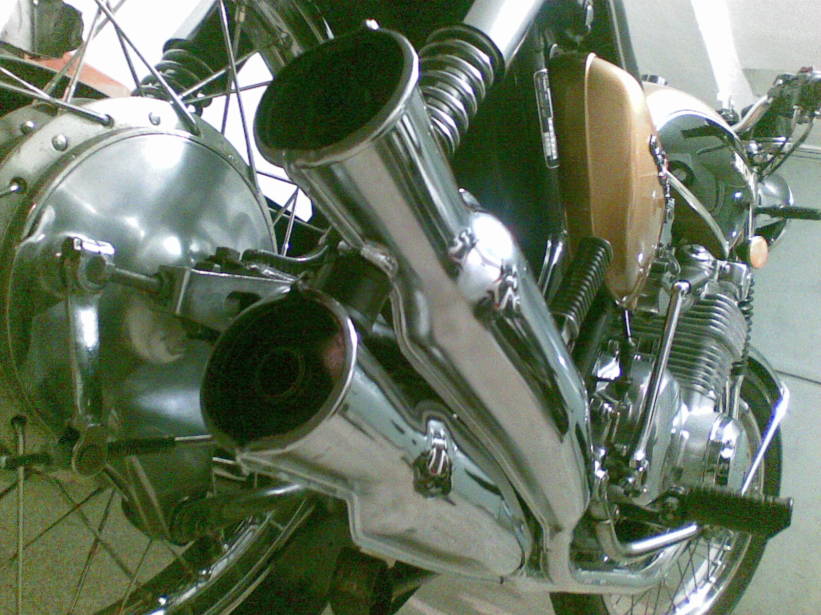 Honda CB 500 Four exhaust